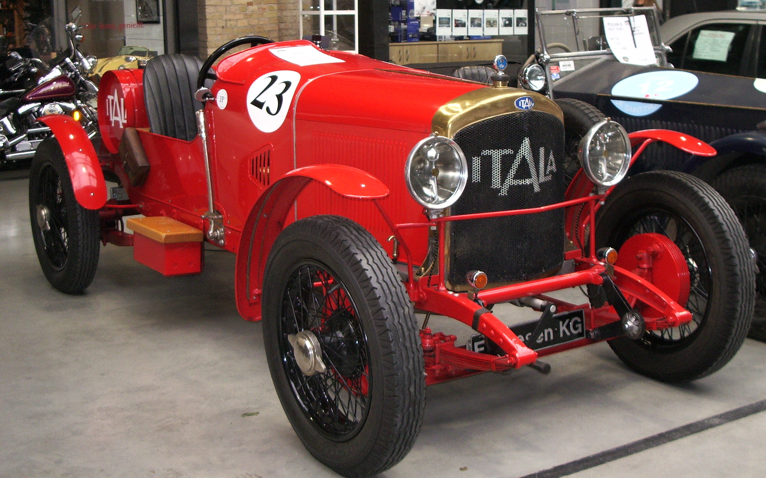 Itala 51 SS aus dem Jahr 1923. Fotografiert im Meilenwerk Berlin